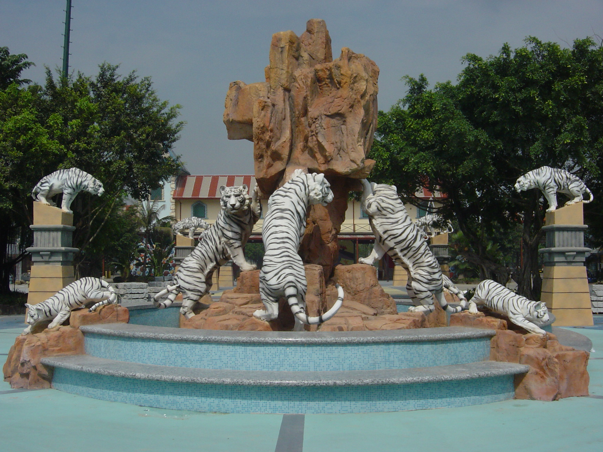 广州长隆欢乐世界入口广场，由上传者老火豆沙煲于2006年2月21日拍摄。